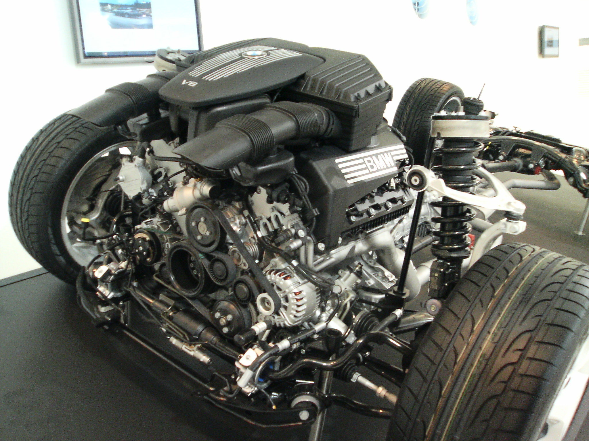 BMW V8 engine